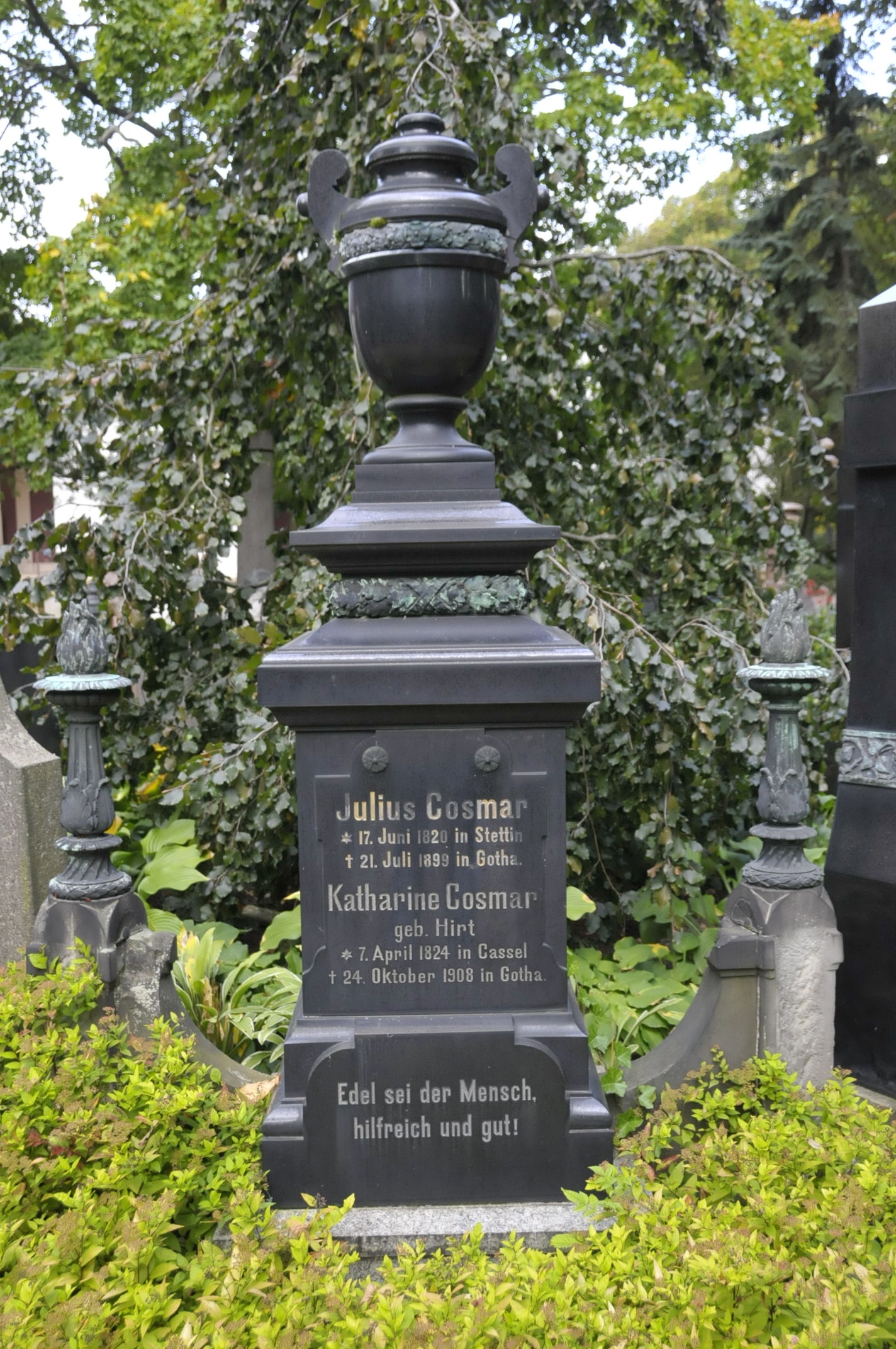 Grabmal der Eheleute Julius Cosmar in Gotha